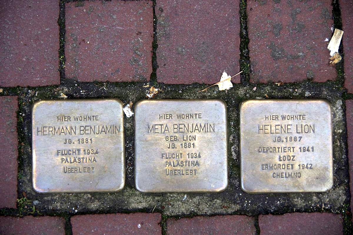 Uelzen in Niedersachsen. Der Stolperstein erinnert an Personen aus Uelzen, die im Dritten Reiche verfolgt worden.